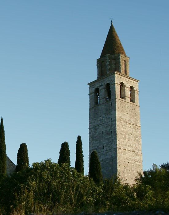 Il campanile della Basilica Patriacale di Aquileia.